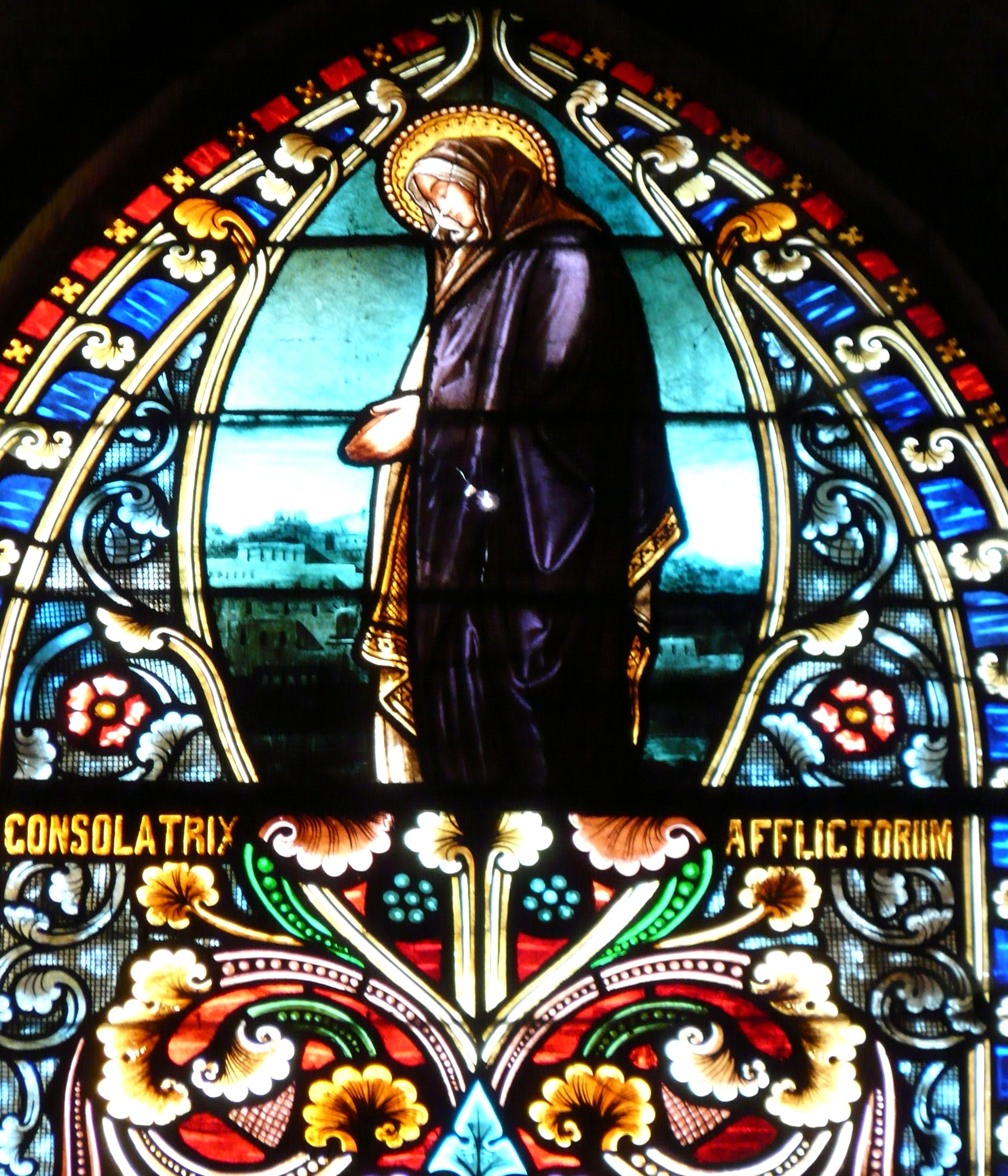 Détail d'un vitrail représentant sainte Marie, église Saint-Thomas, Excideuil, Dordogne, France.